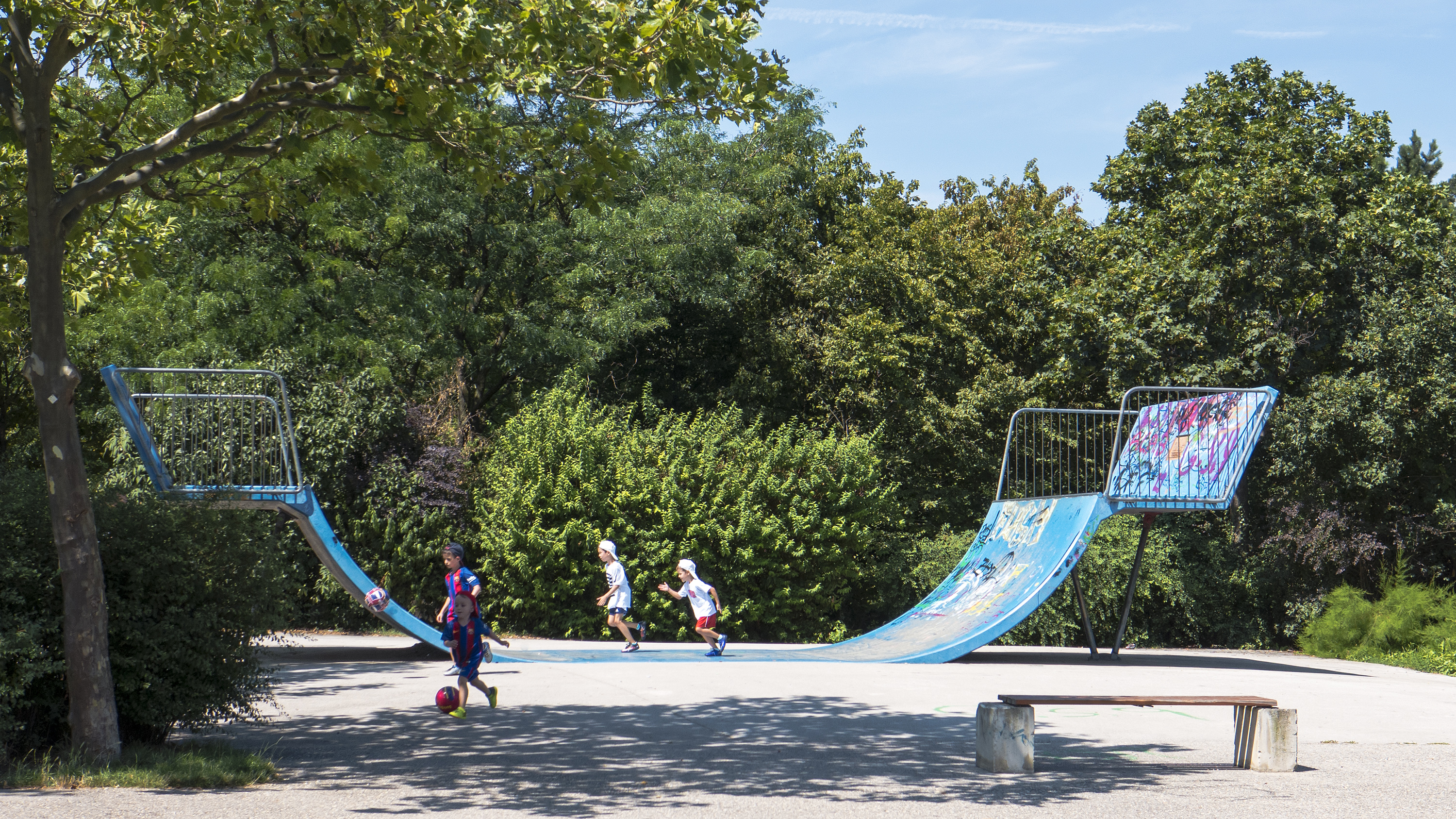 Fridtjof-Nansen-Park in Wien 23